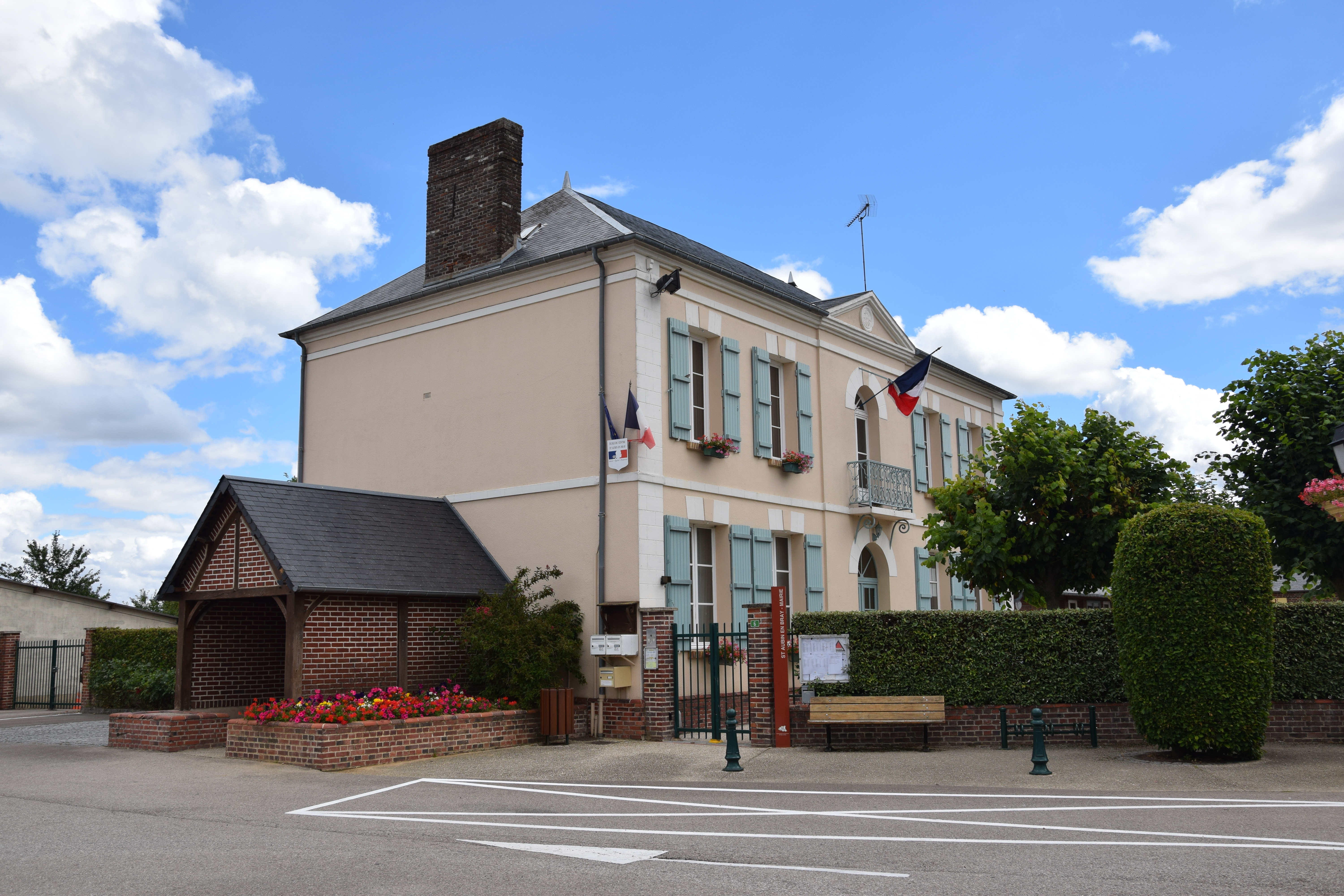 Saint-Aubin-en-Bray